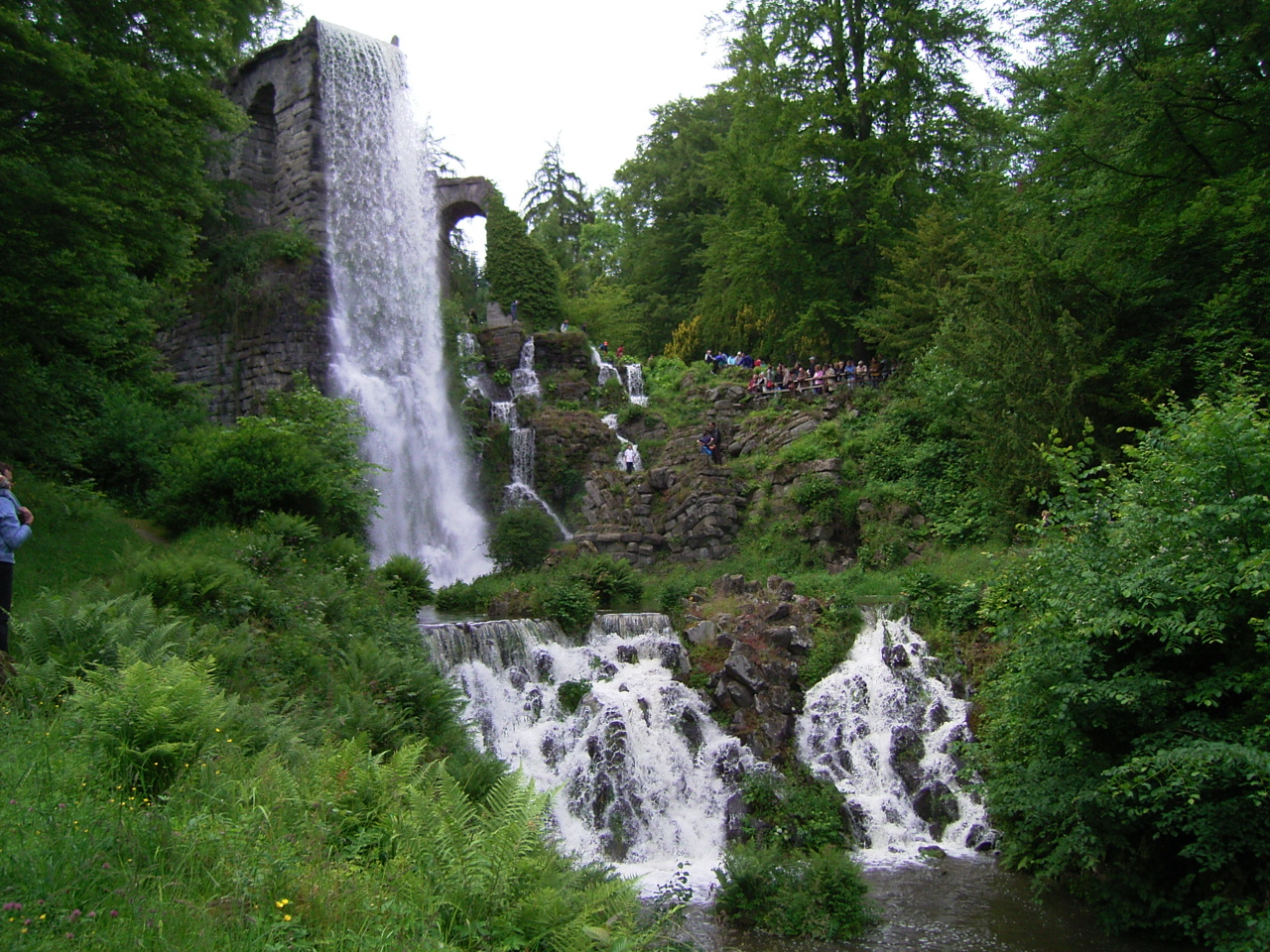 Bergpark wilhelmshoehe aquaedukt Photograph: Benutzer:Hafenbar